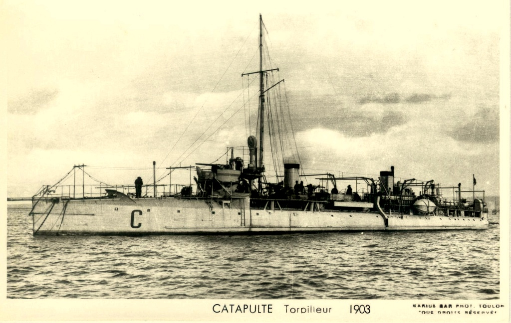 Contre-torpilleur : Catapulte